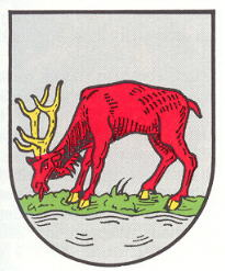 Wappen von Langenbach (Pfalz)